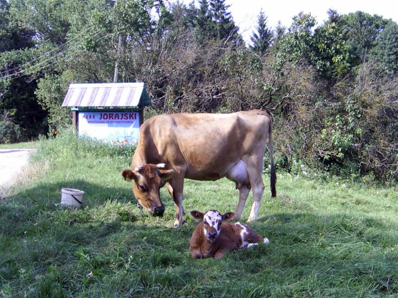 Park Jorajski; Jora Wielka; Gmina Mikołajki; Polska